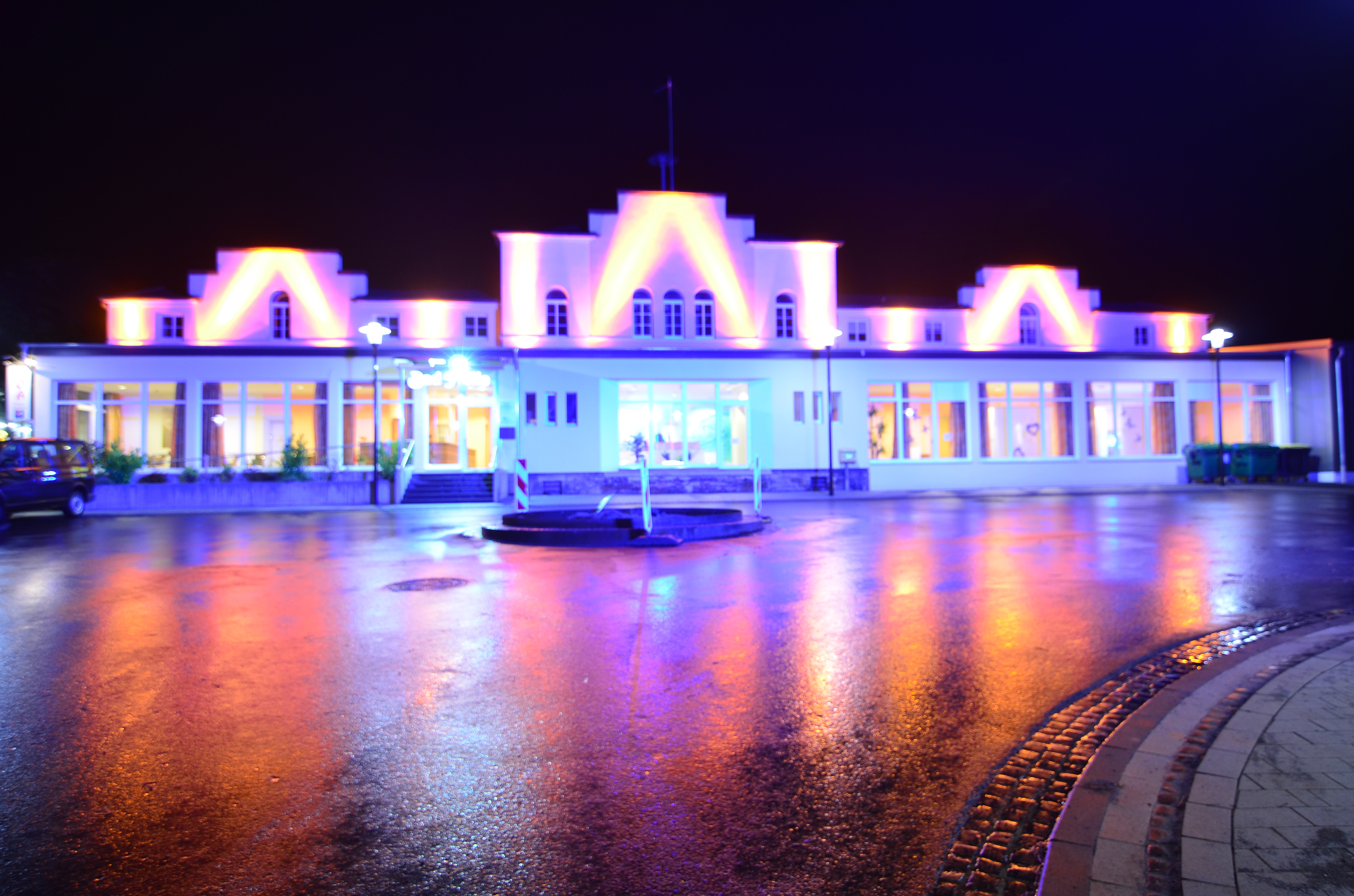 Fabelhaftes Melle 2013